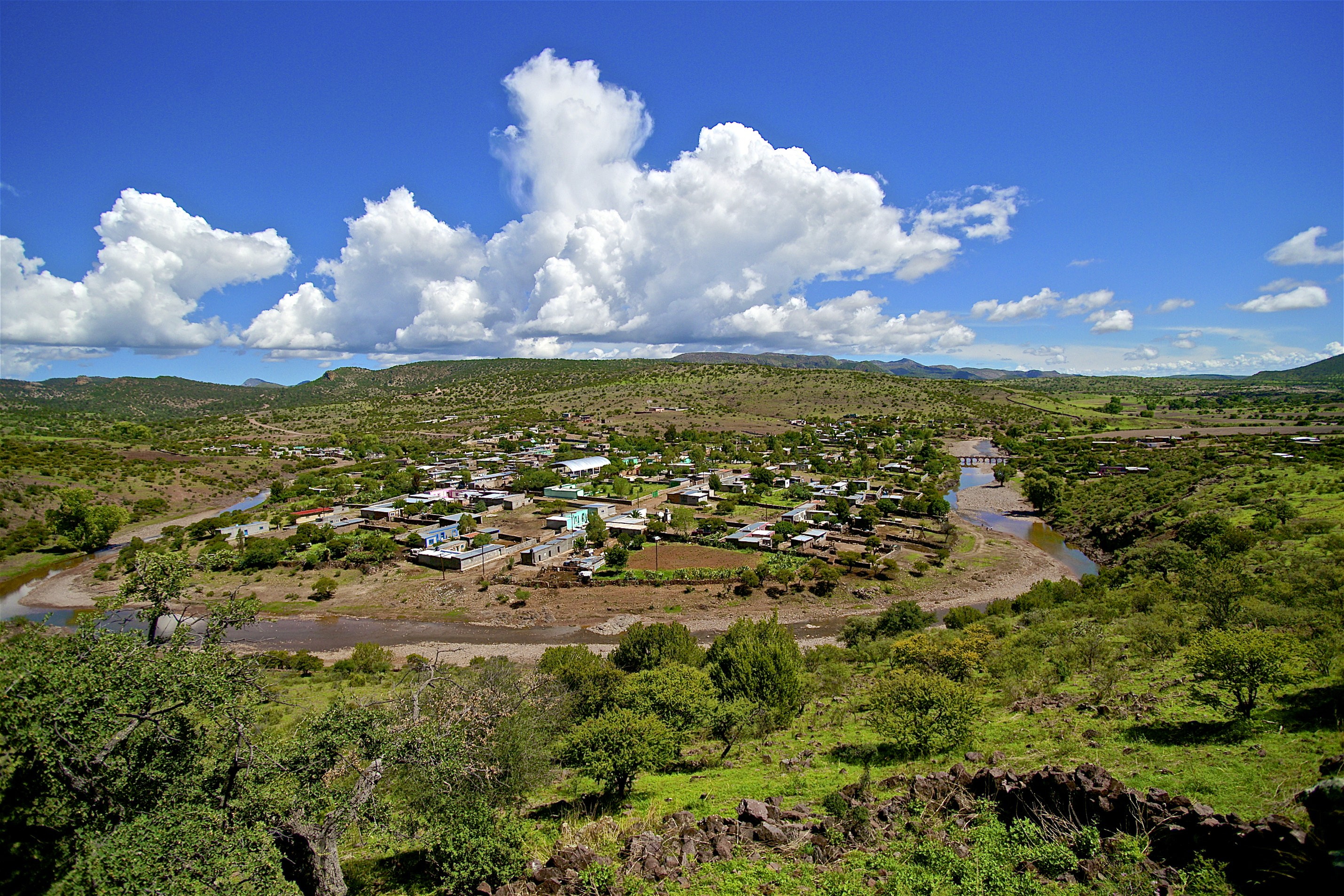 El porvenir desde las alturas